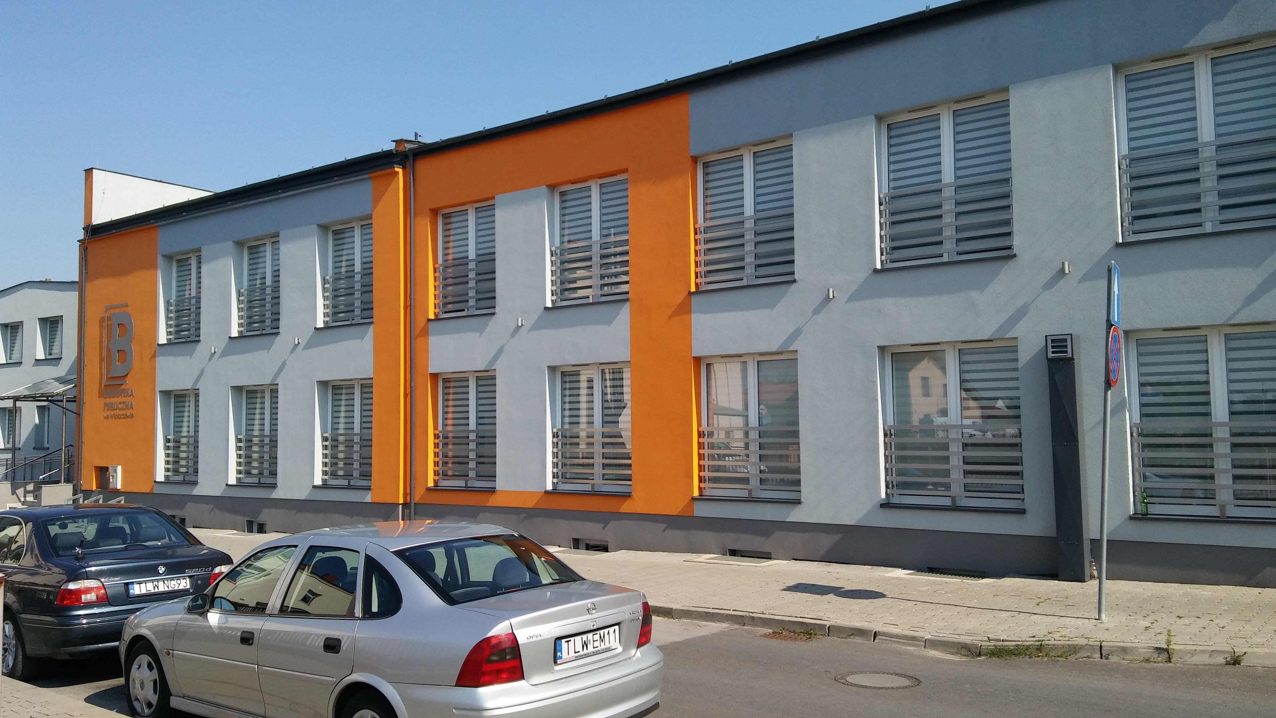 Budynek Biblioteki Publicznej we Włoszczowie.